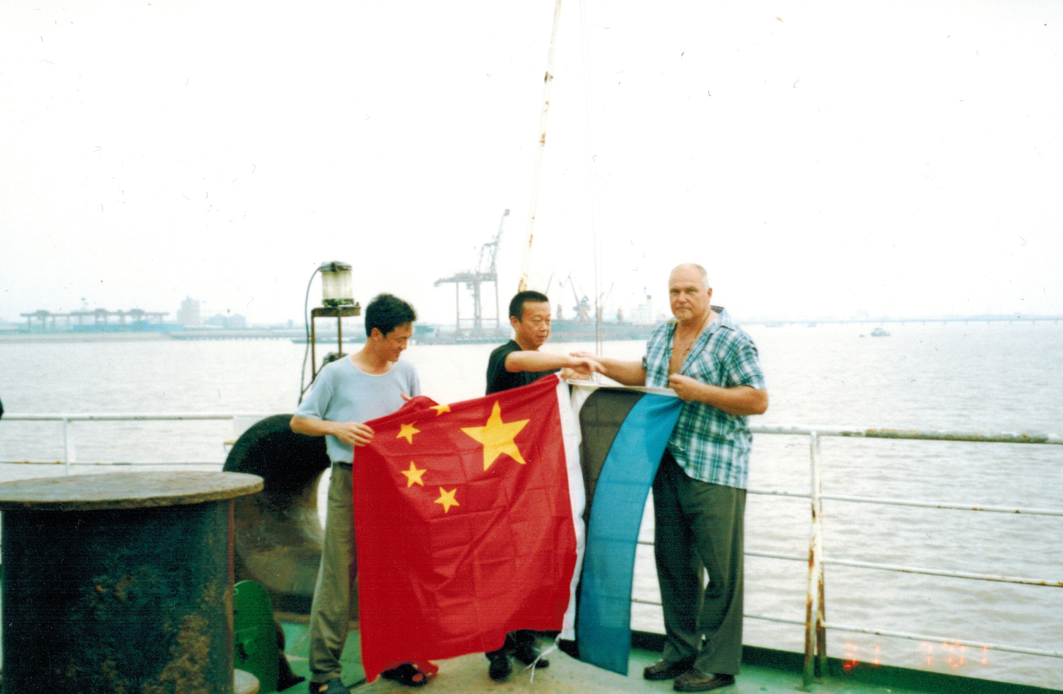 Puistlastilaev Gustav Sule. Eesti lipu langetamine ja Hiina lipu heiskamine 2001. a.